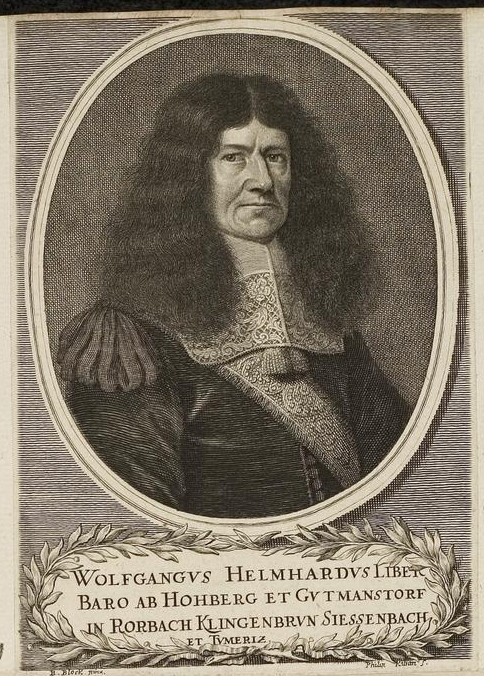 Grafik aus dem Klebeband Nr. 1 der Fürstlich Waldeckschen Hofbibliothek Arolsen Motiv: Wolf Helmhardt von Hohberg (1612–1688), Schriftsteller des Barock Text: Wolfgangus Helmhardus Liber Baro ab Hohberg et Gutmanstorf in Rorbach Klingenbrun Siessenbach et Tumeriz